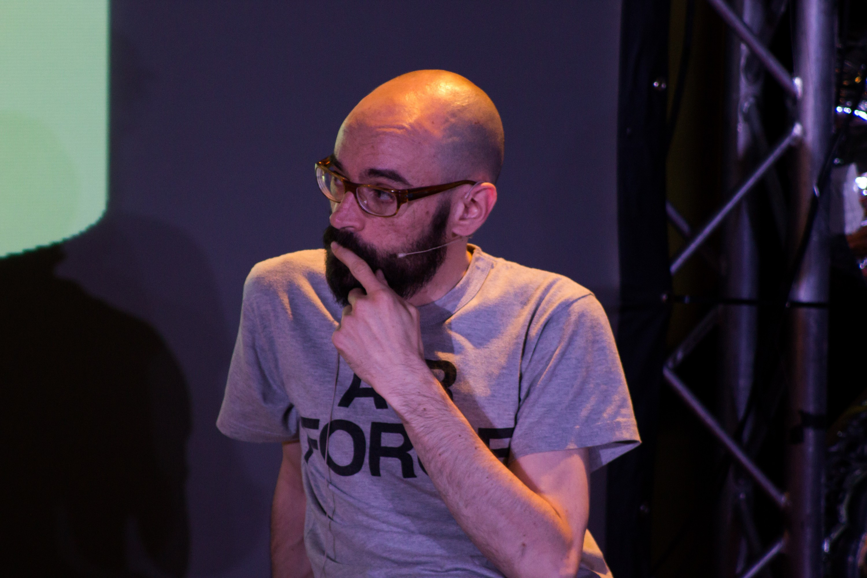 Eloy Fernández Porta es un escritor y ensayista español nacido en Barcelona en 1974.